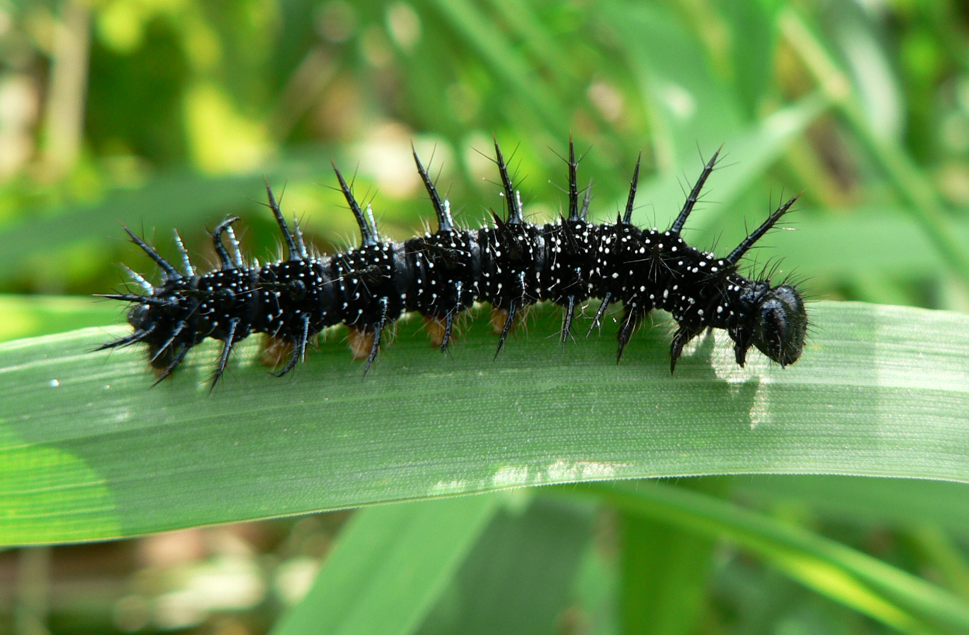 Chenille de Paon du jour (Nymphalis io, anciennement Inachis io)